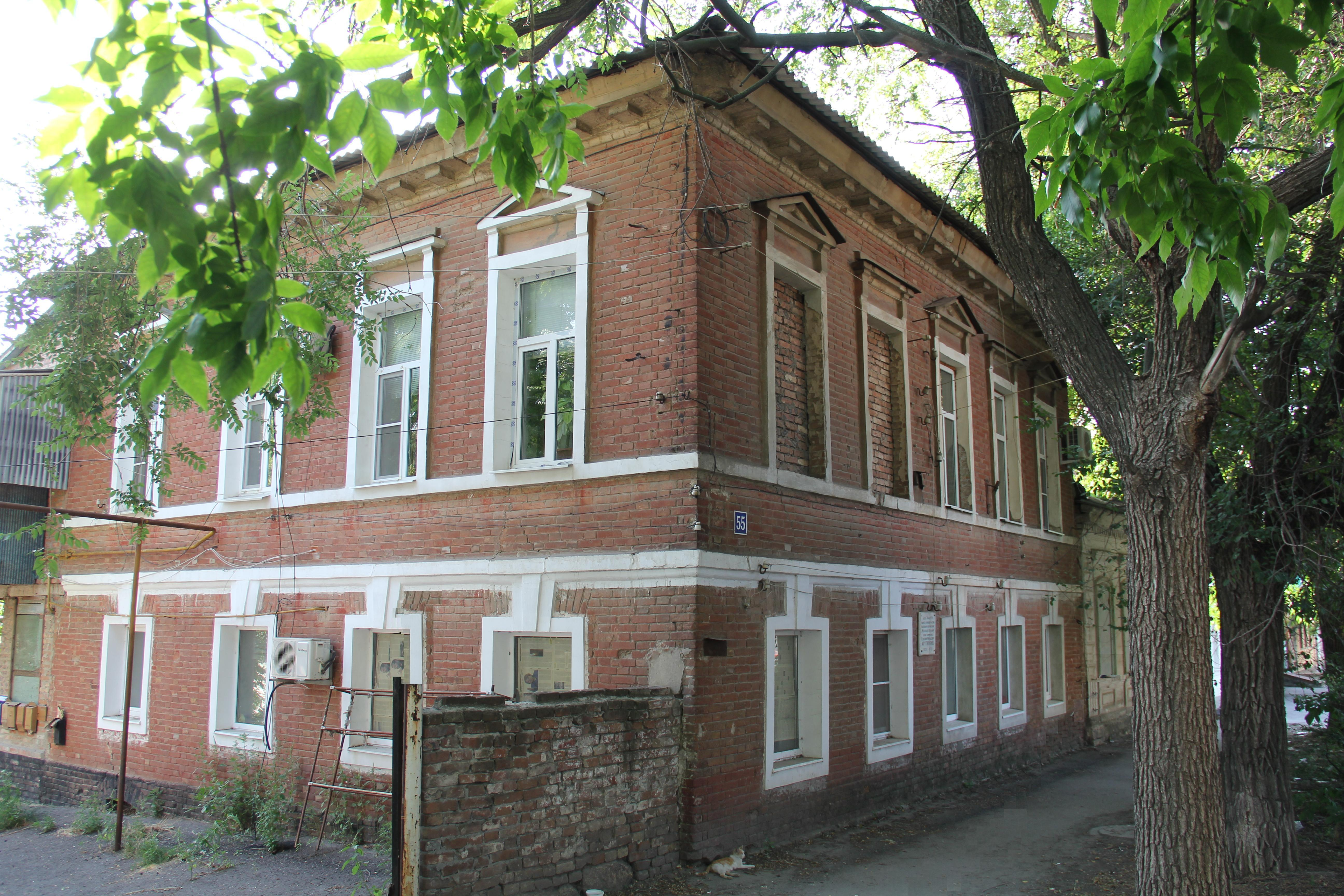 Дом, в котором 31 мая 1925 года родился Арутюнянц Георгий Минаевич.